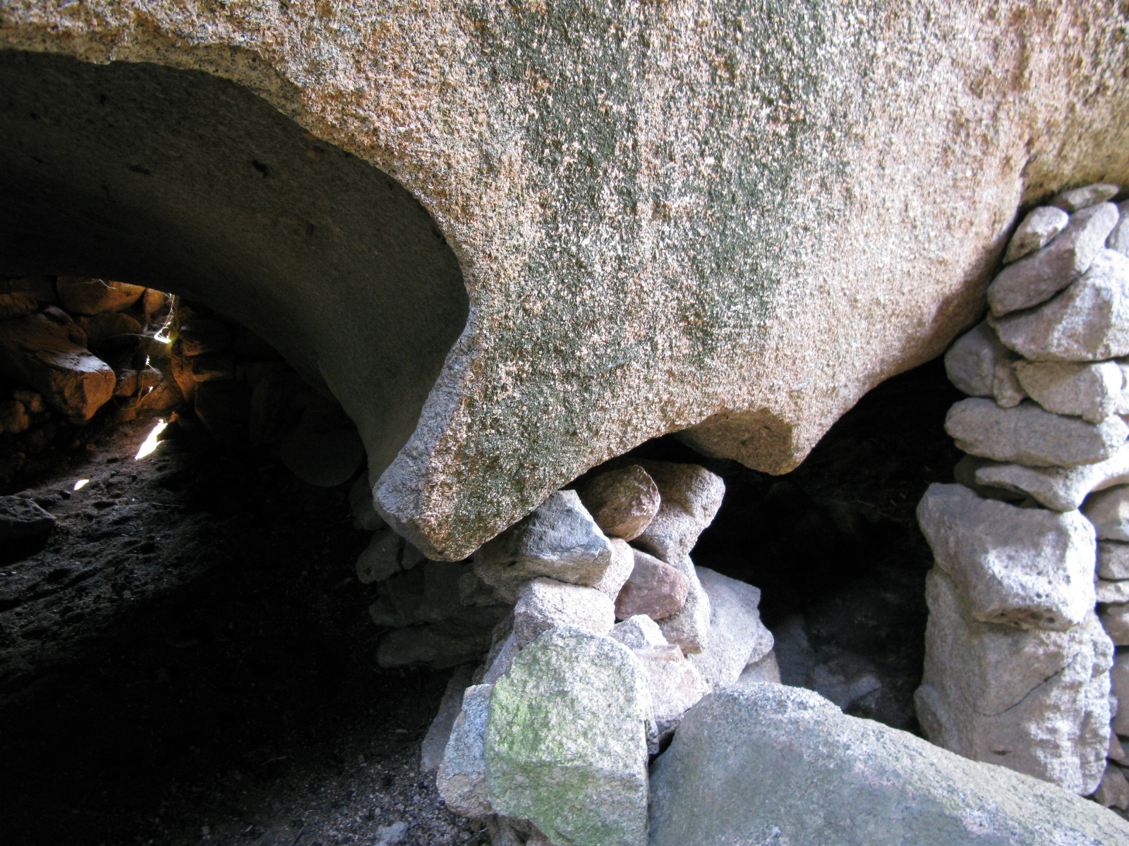 abitazione preistorica